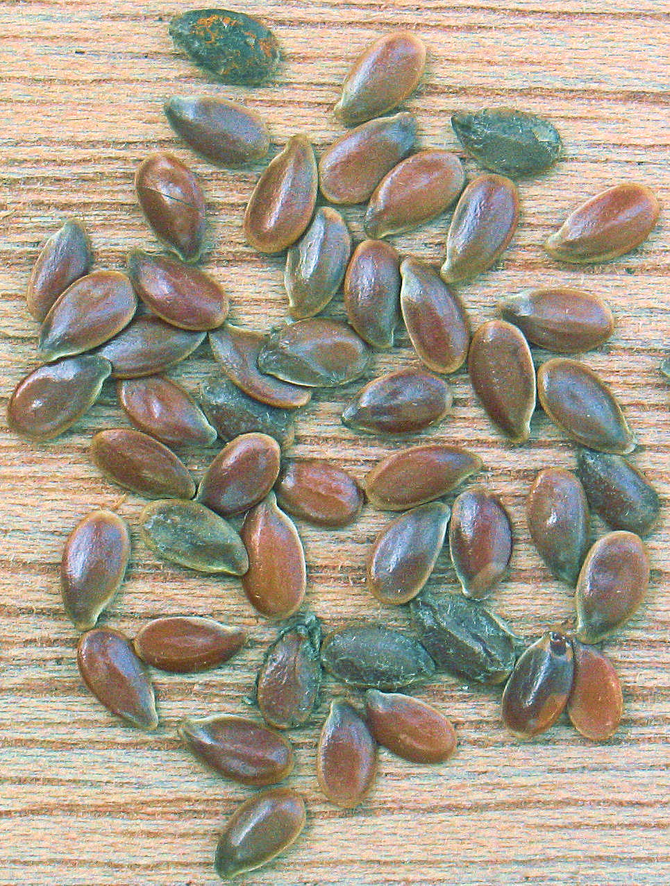 Linum usitatissimum (linseed for oil)